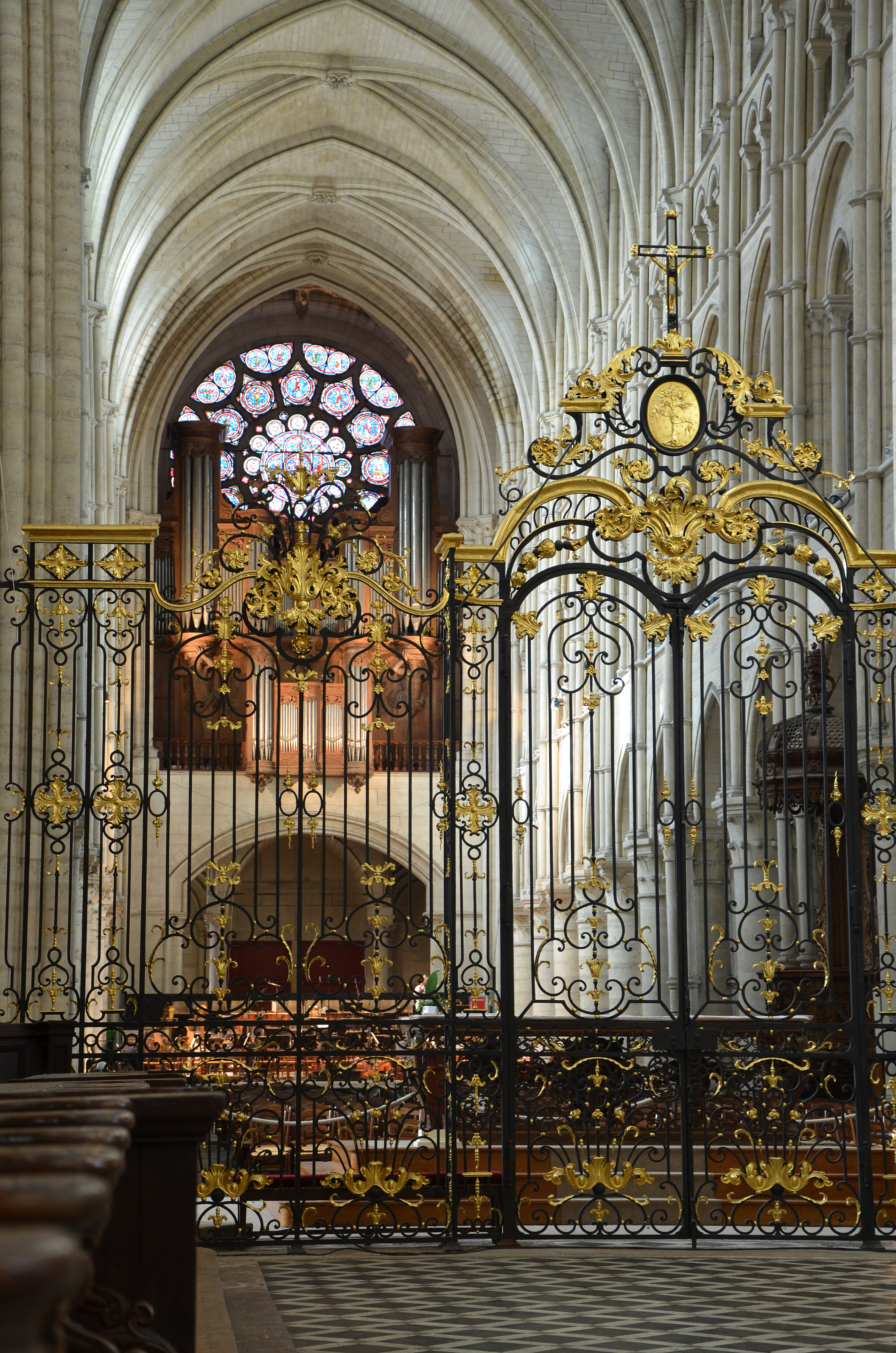 Grille du chœur, orgue, et rosace ouest de la cathédrale de Laon, Aisne, France